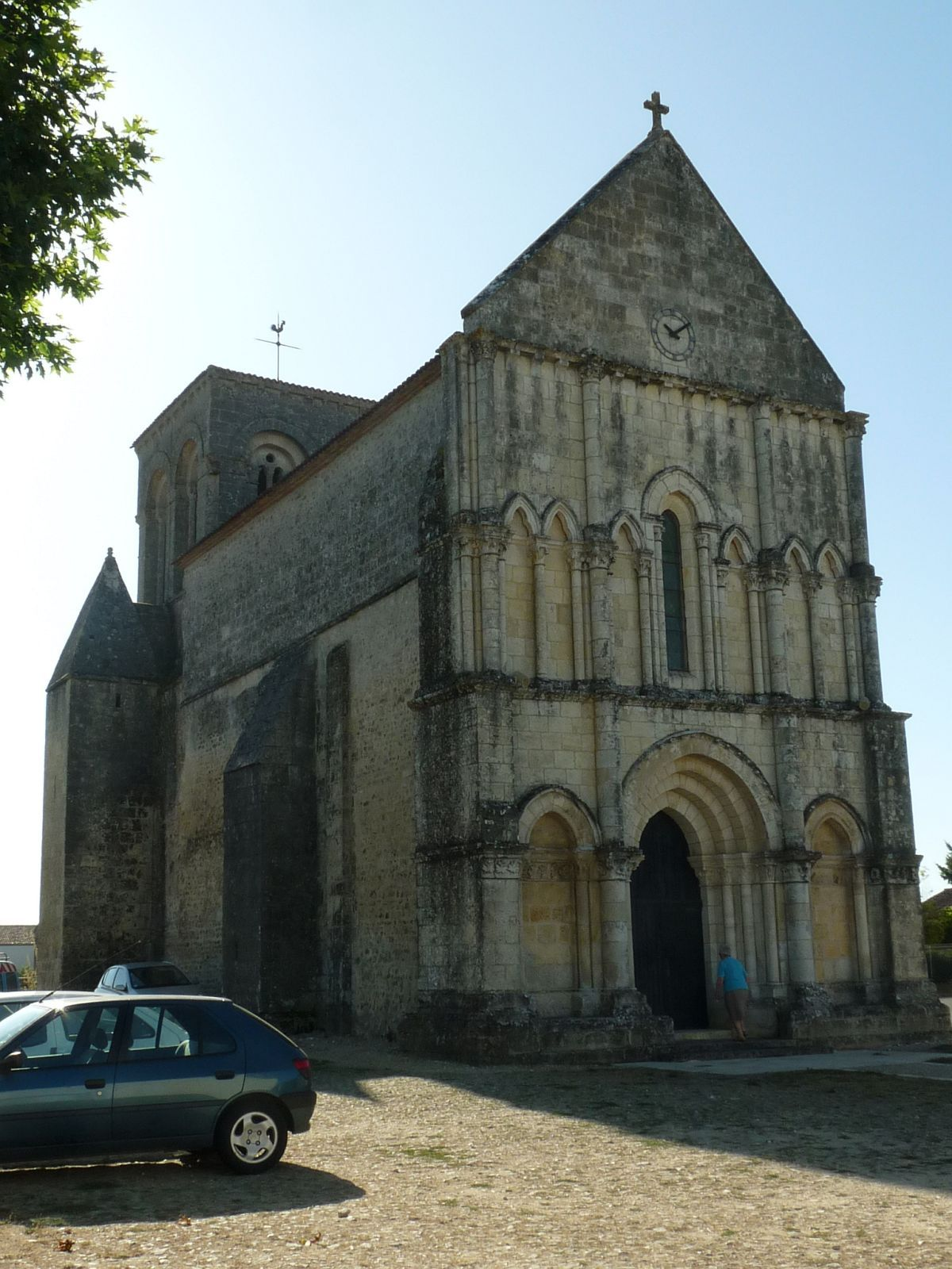 église de Montpellier-de-Médillan (17), France.